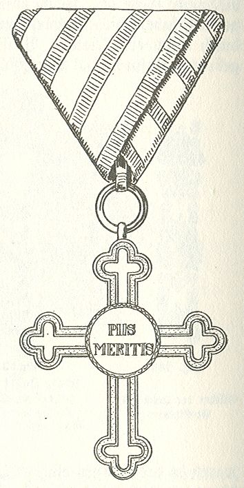 Scan van Blz. 286 van het boek "Handbuch der Ritter- und Verdienstorden " uitgegeven 1893 door Weber.Tekening van de in 1902 overleden Maximilian Gritzner. Robert Prummel 10 jul 2008 16:40 (CEST)